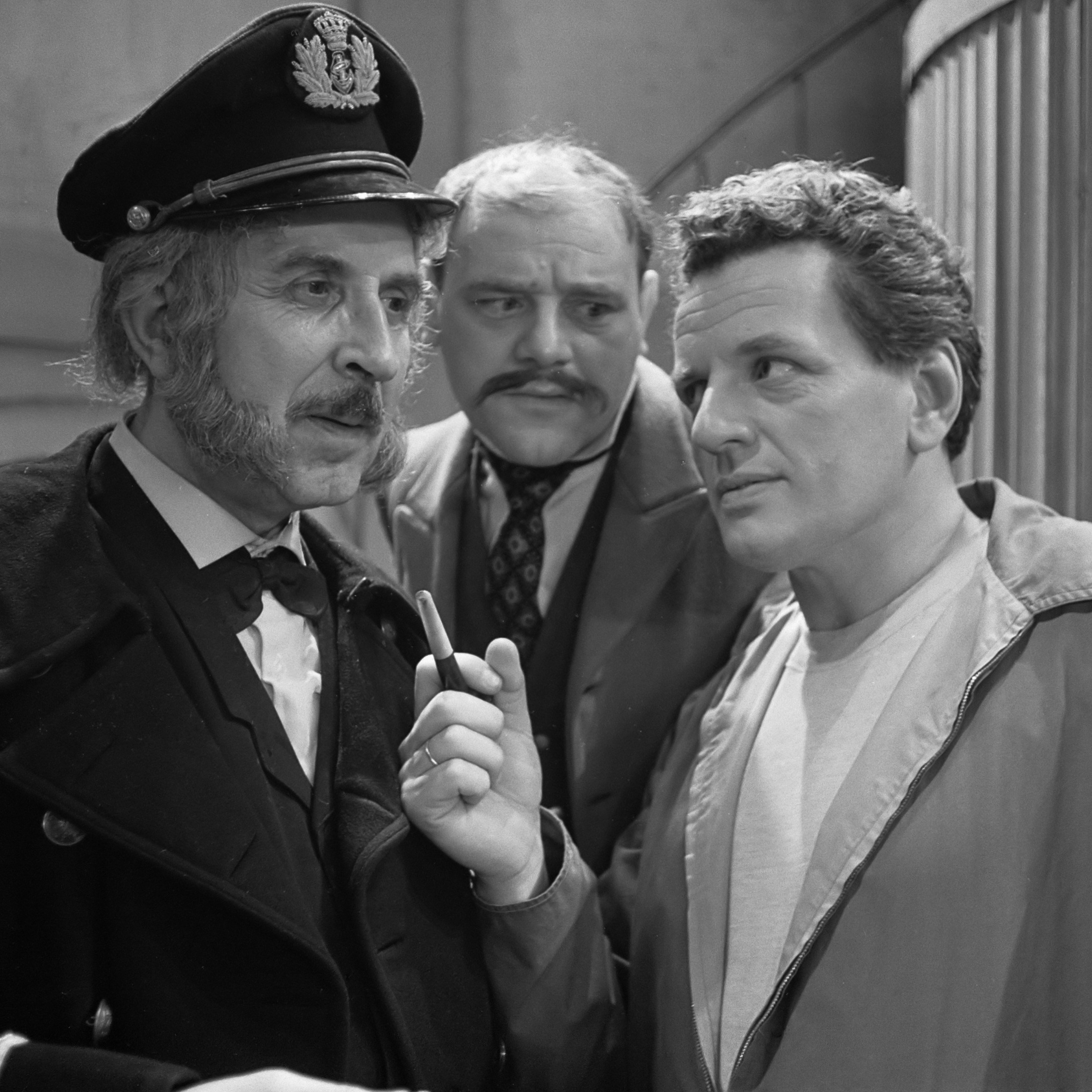 Televisiespel "De Vuurtorenwachter" . Rob de Vries en Hans Tiemeyer , Bernhard Droog 24 januari 1962